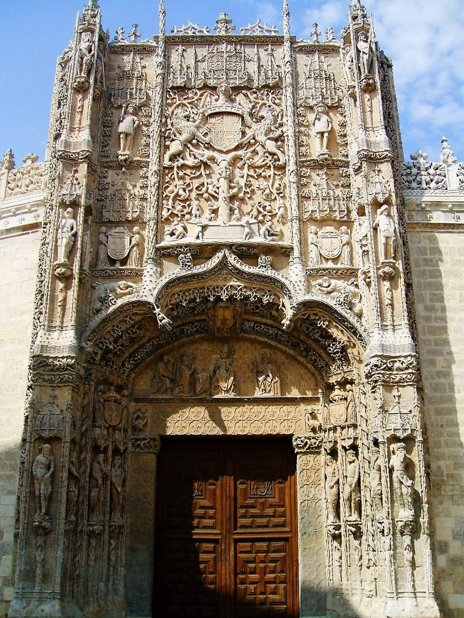 Colegio de San Gregorio, Valladolid